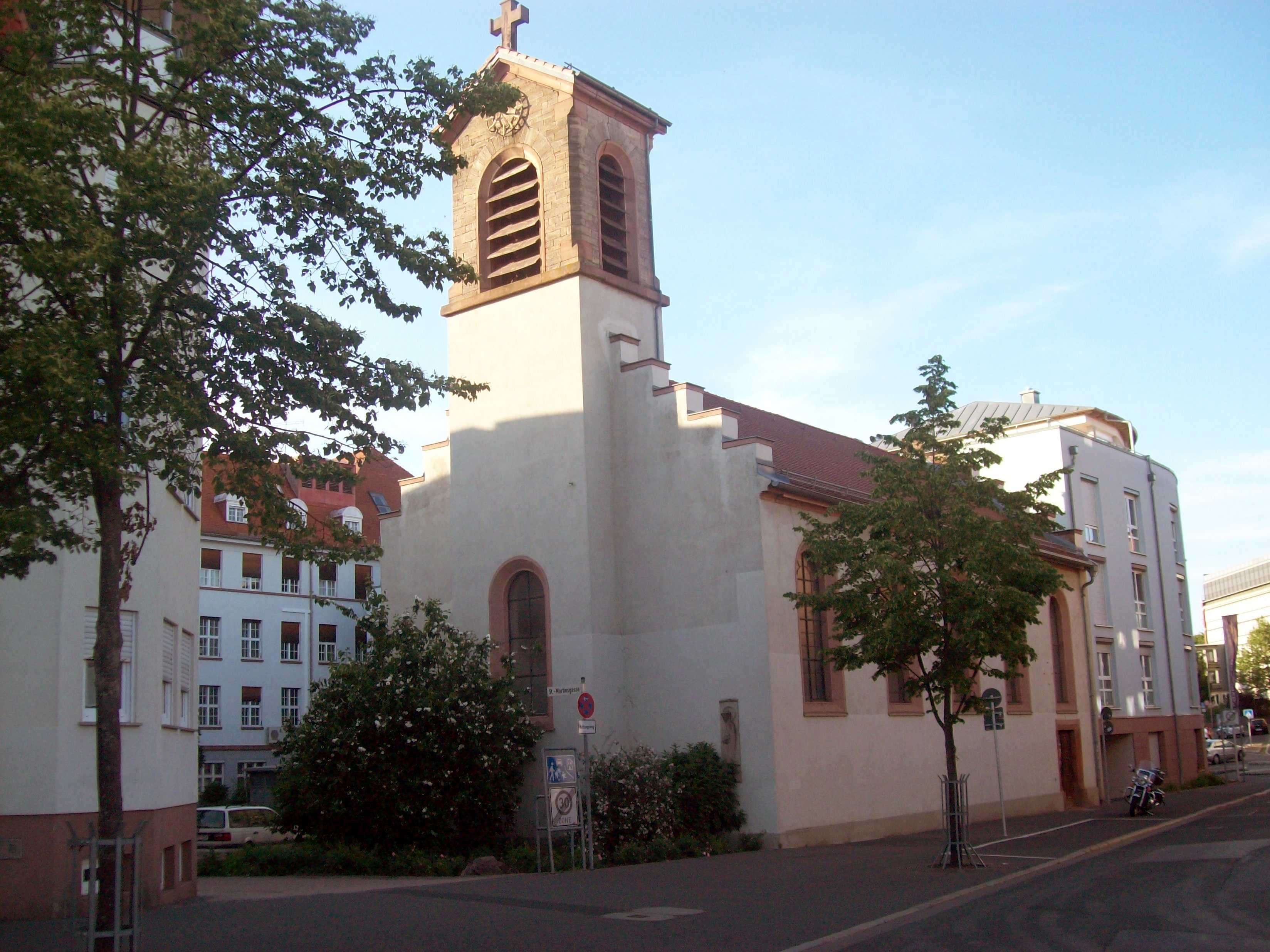 Spitalkirche St. Katharina am ehemaligen Städt. Krankenhaus - Straßenseite Lamprechtstraße